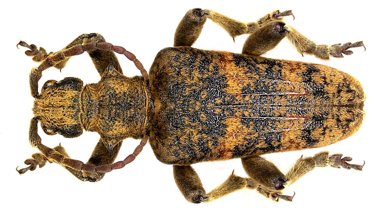 Familie: Cerambycidae Groesse: 17-30 mm Verbreitung: Europa Ökologie: Entwicklung in Laubbäumen Fundort: Germania, Bayern, Oberfranken, Kasendorf leg.det. U.Schmidt, 1976 Photo: U.Schmidt, 2005